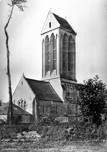 Ensemble Nord-Est de l'église d'Étréham.